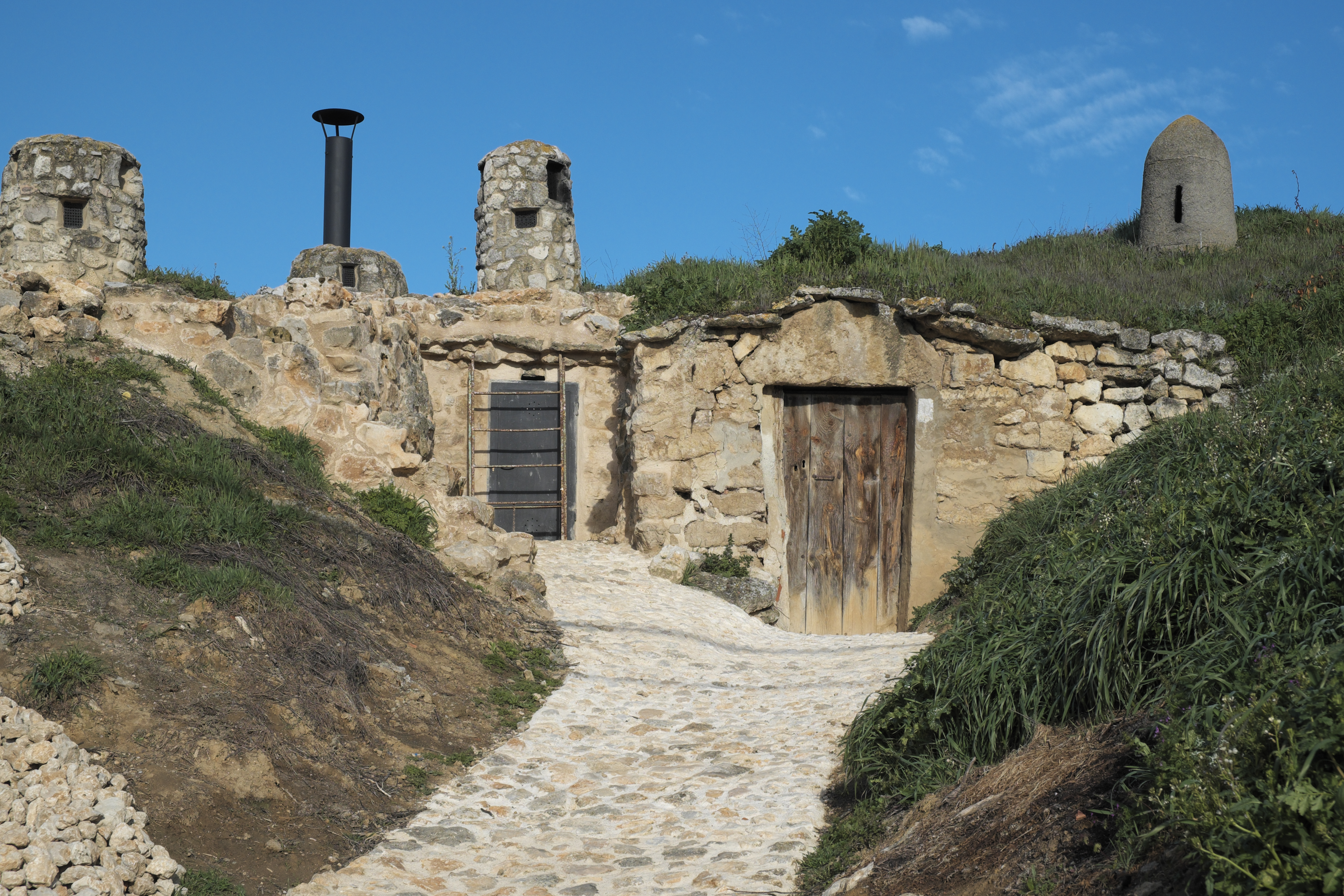 Bodegas in Mucientes in der Provinz Valladolid (Kastilien-León/Spanien)